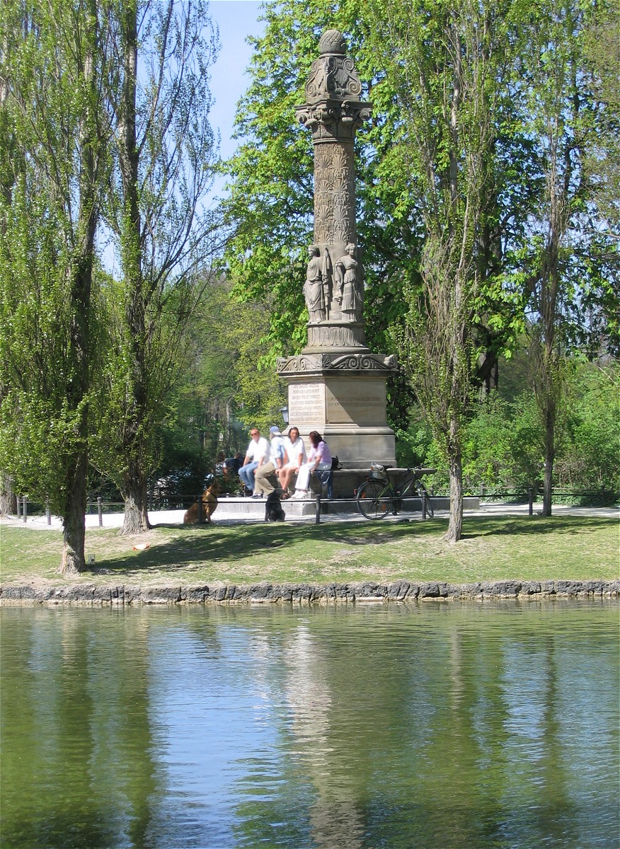 Sckell-Denkmal (Friedrich Ludwig von Sckell, 1750-1823) im Englischen Garten in München